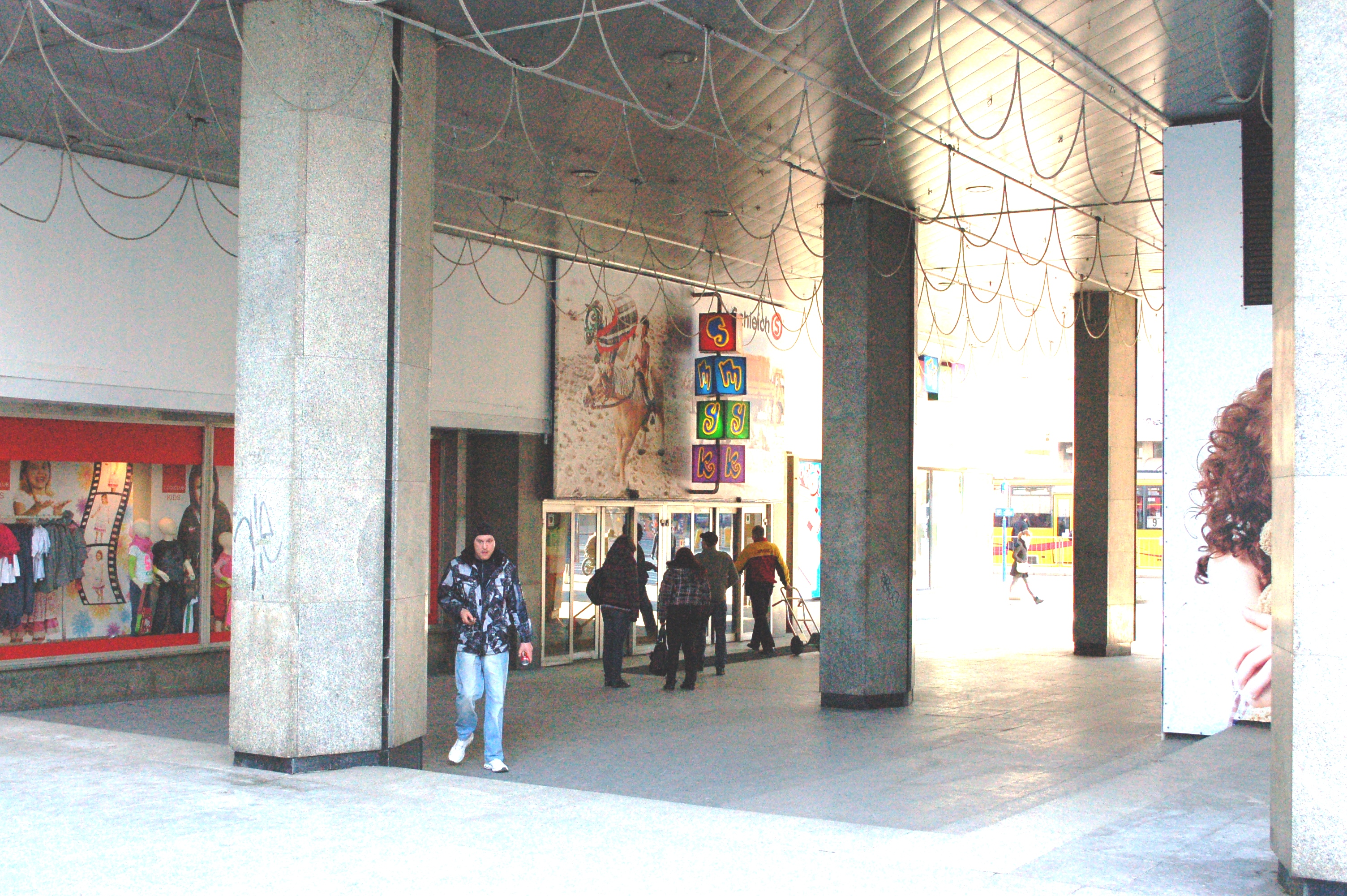 Smyk, warschau, Eingang